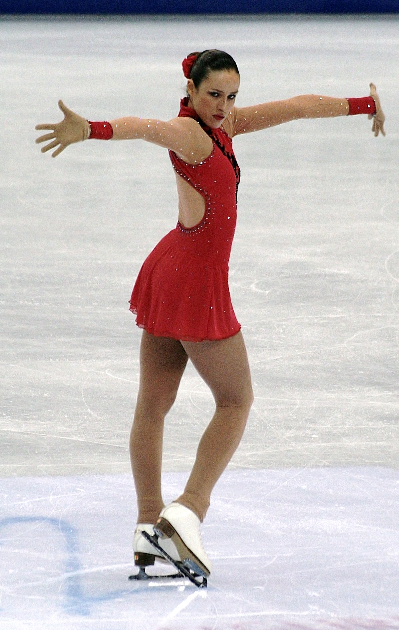 Изабель Пиман (Бельгия) на чемпионате мира по фигурному катанию 2012.